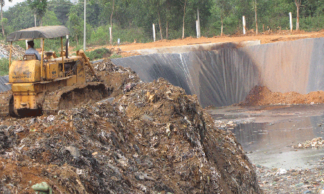 Hình ảnh về bãi chôn lấp rác hợp vệ sinh ở bãi chôn lấp Phước Hiệp huyện Củ Chi TpHCM.Bãi chôn lấp đã được lót giấy nilong để tránh nước rỉ rác ngấm vào tầng nước dưới đất